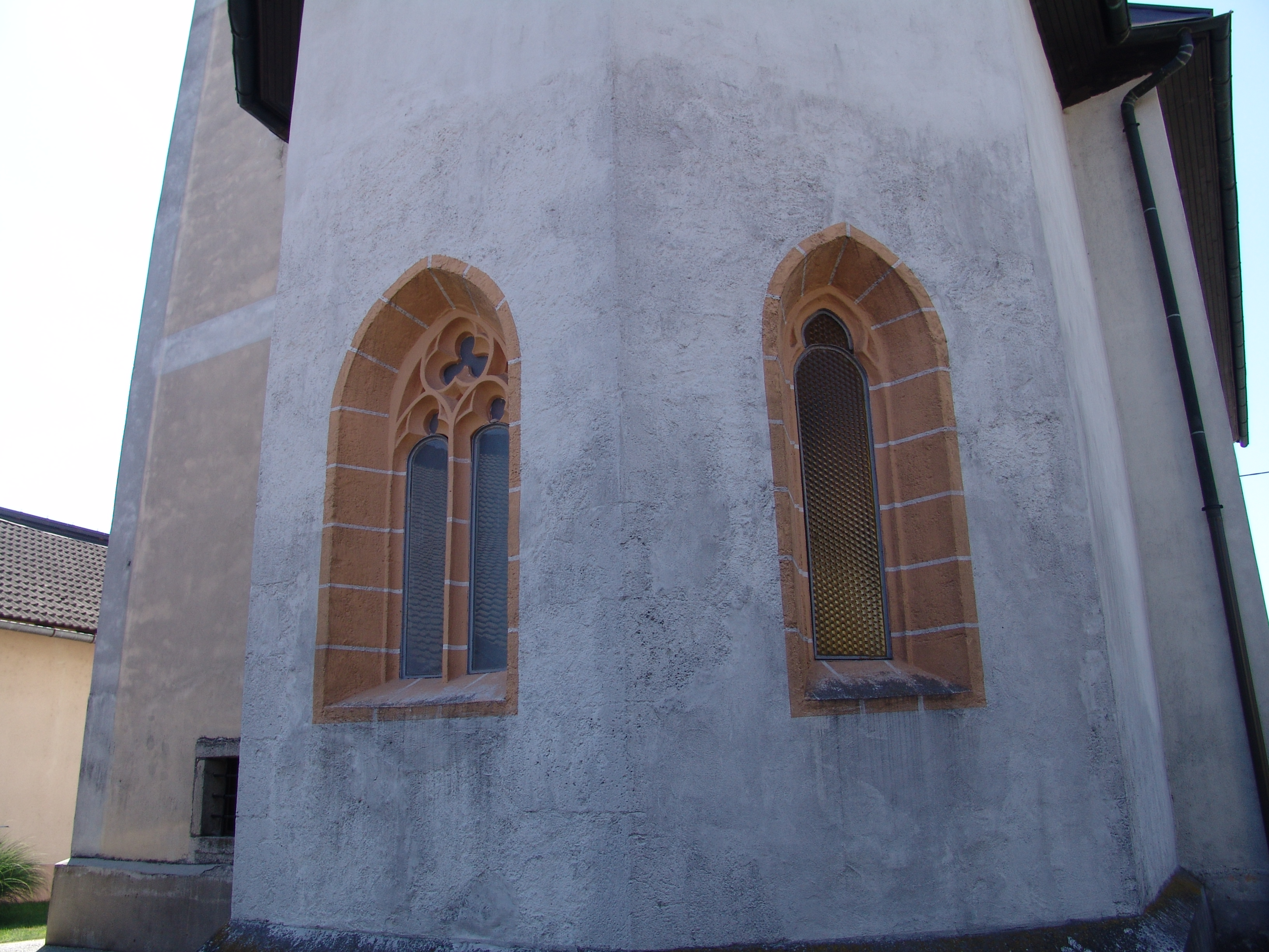 Okno v prezbiteriju cerkve sv. Urha, odkrito 1989